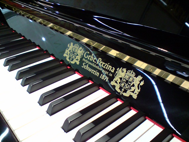 Perzina 122 model, Product of Yantai-Perzina Piano Manufacturing Company, Yantai, China.